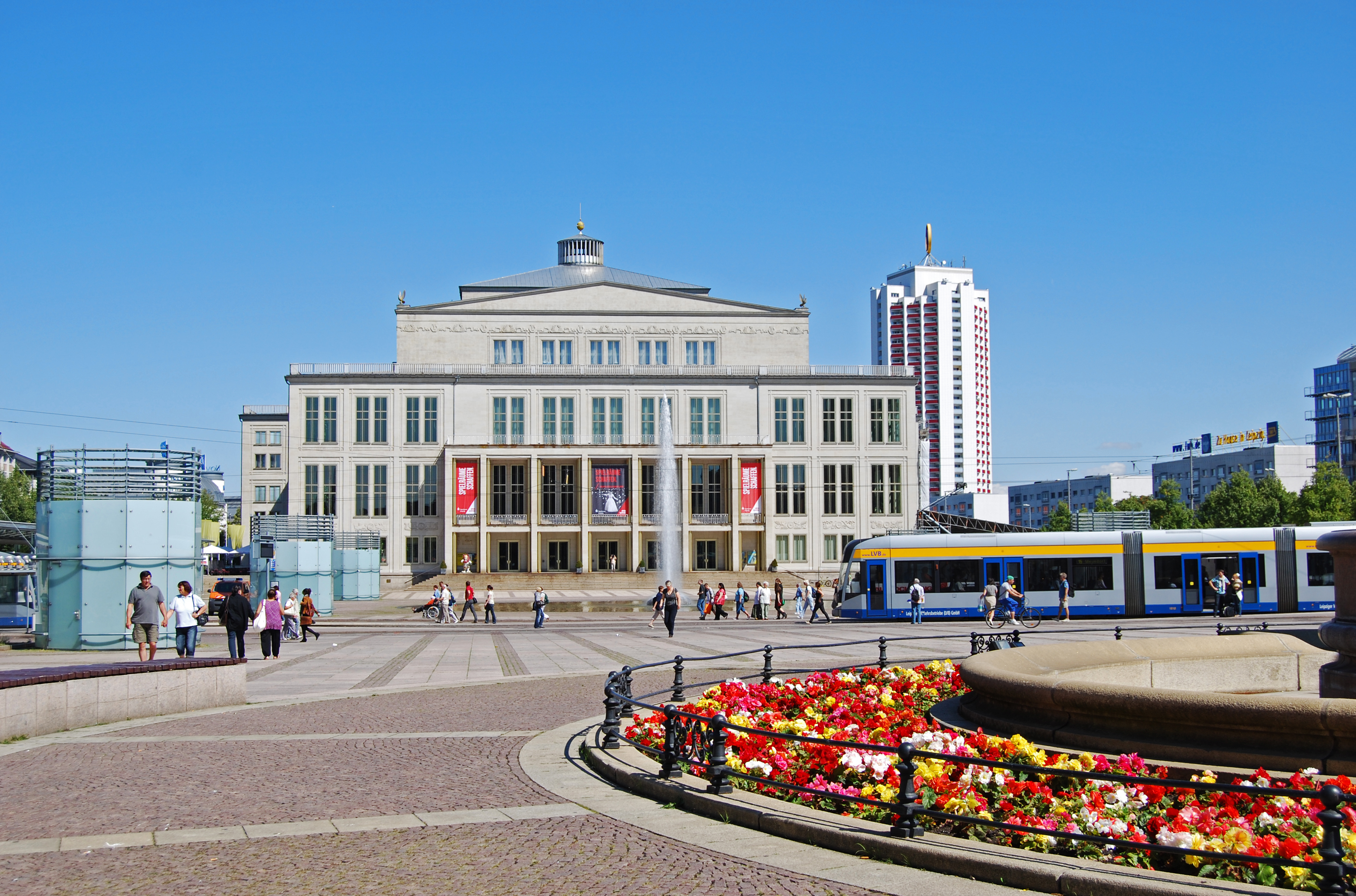 Opernhaus Leipzig